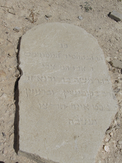 קברו של ר' אברהם צבי ברודנא בחלקת חב"ד ד' בהר הזיתים